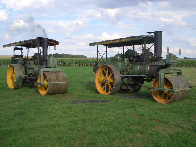 Dampfwalzen Dampffreundeclub 3054 Schüpfen.